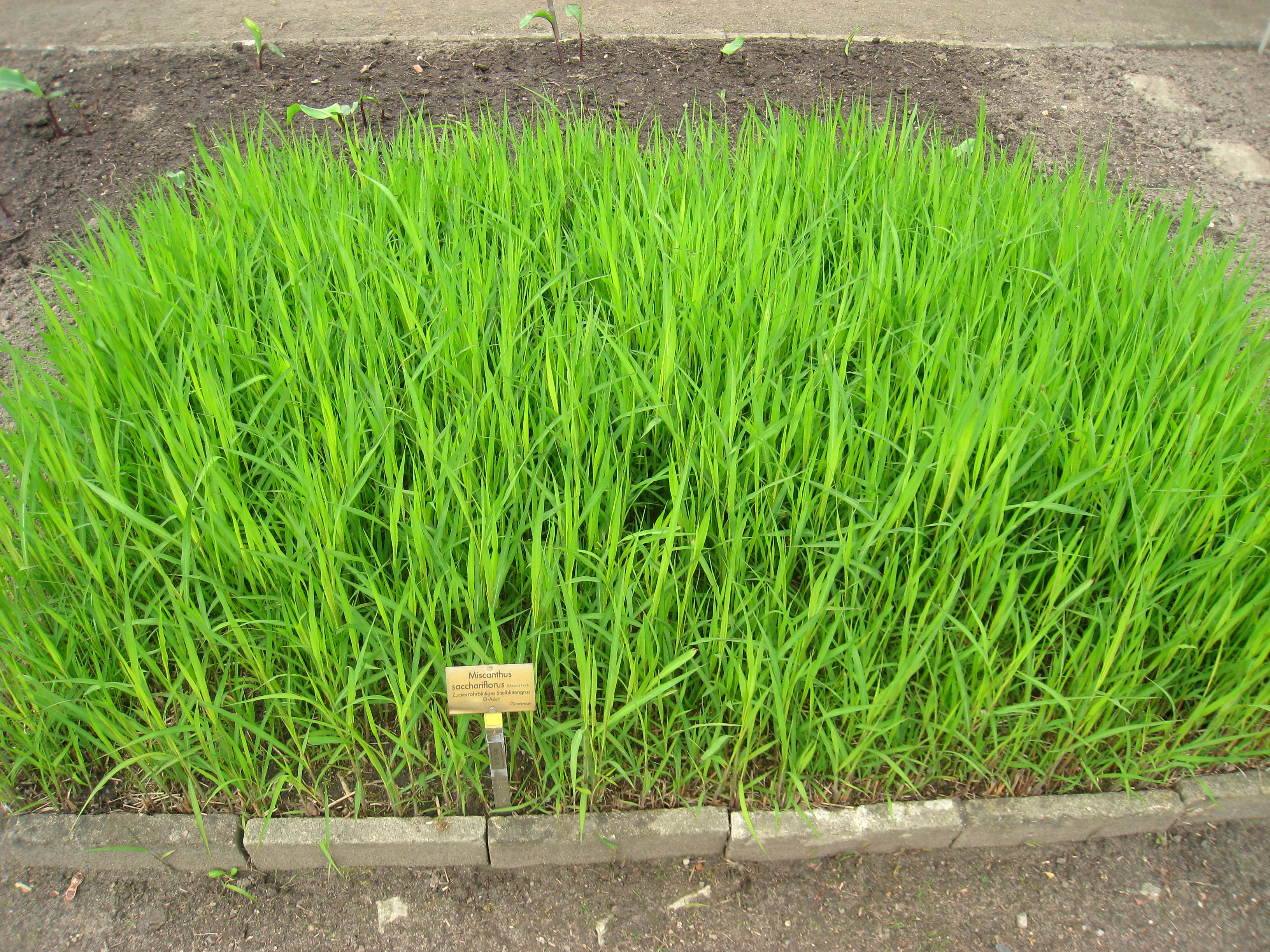 Miscanthus sacchariflorus specimen in the Botanischer Garten, Berlin-Dahlem (Berlin Botanical Garden), Berlin, Germany.